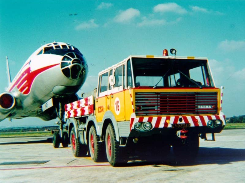 Tatra T813 tugging Tu-104